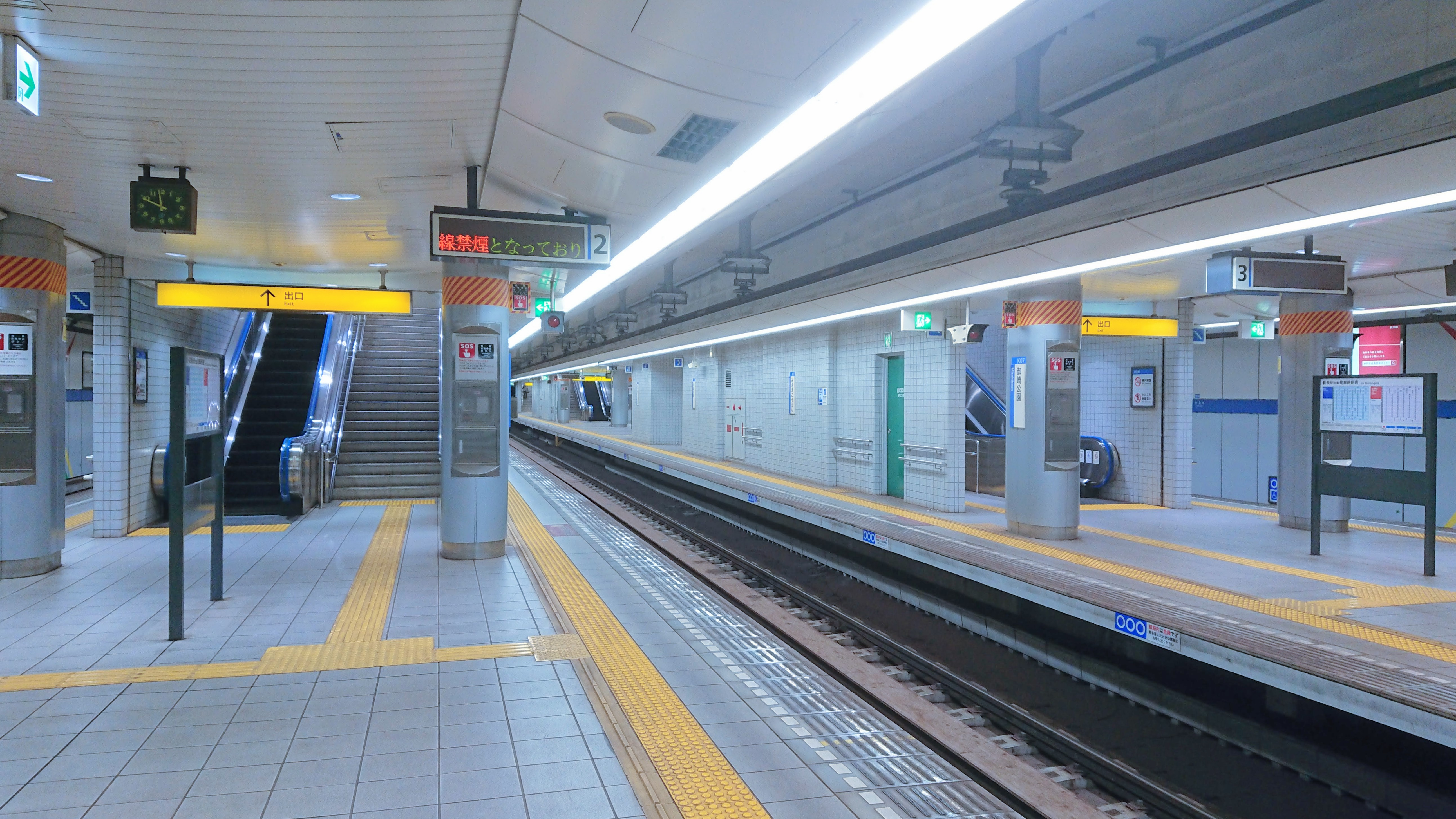 神戸市交通局（神戸市営地下鉄）海岸線 K07 御崎公園駅 2･3番線ホームを西側（新長田寄り）より